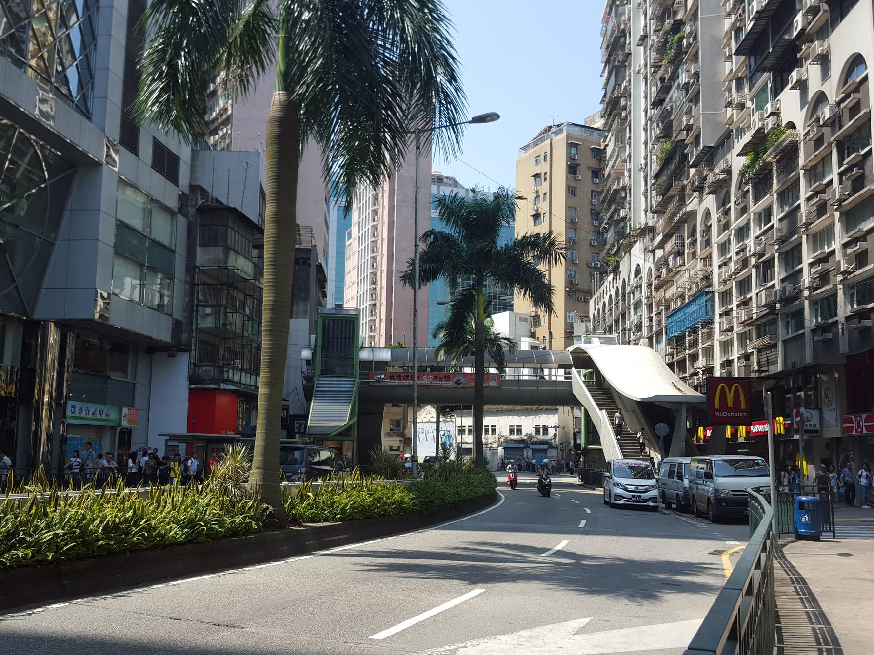 Rua do Campo